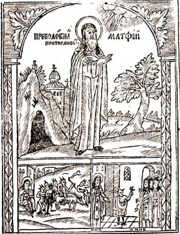 Матфей Печерский, прозорливый